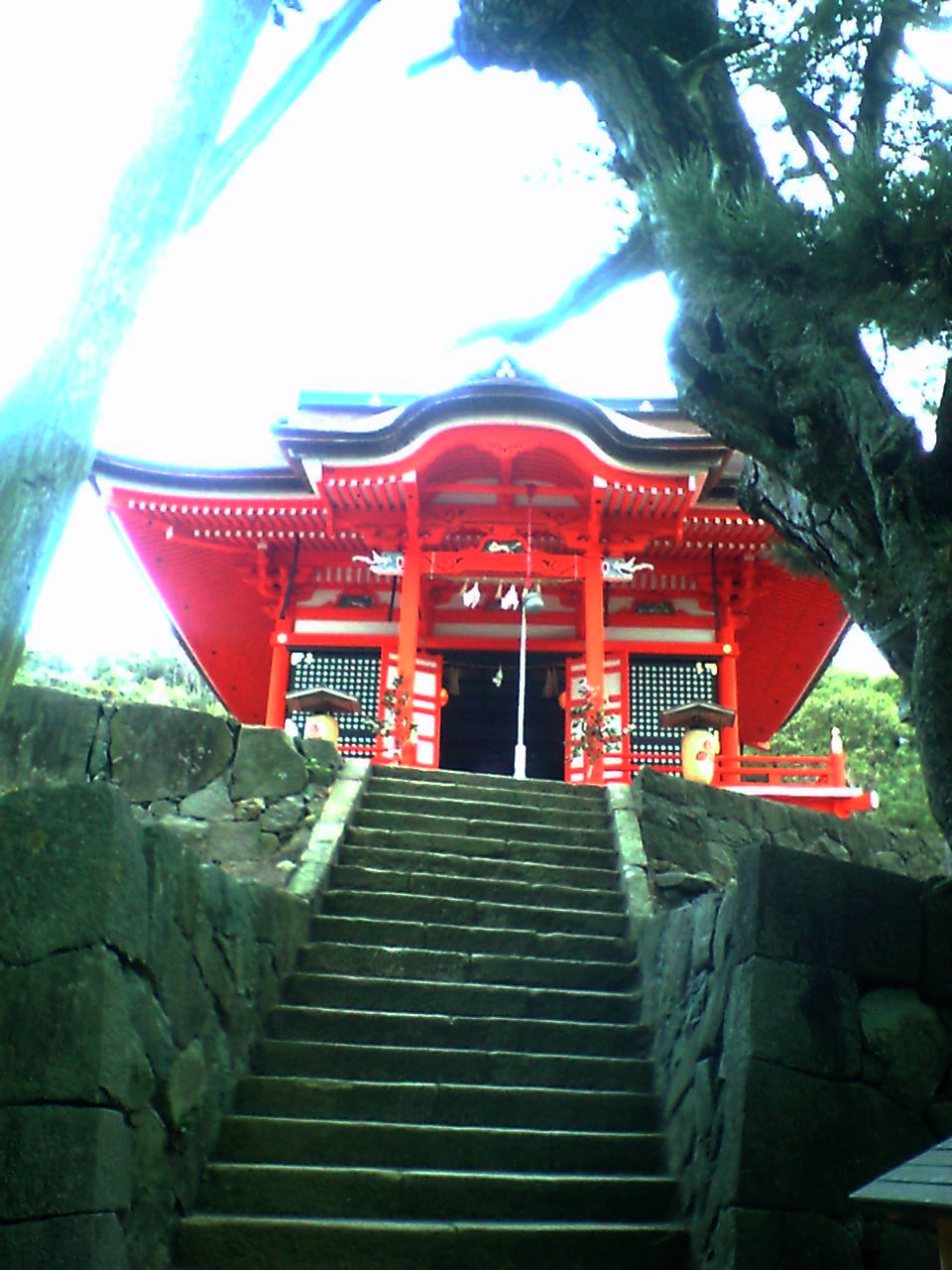 日御碕神社 上の本社(神の宮)。